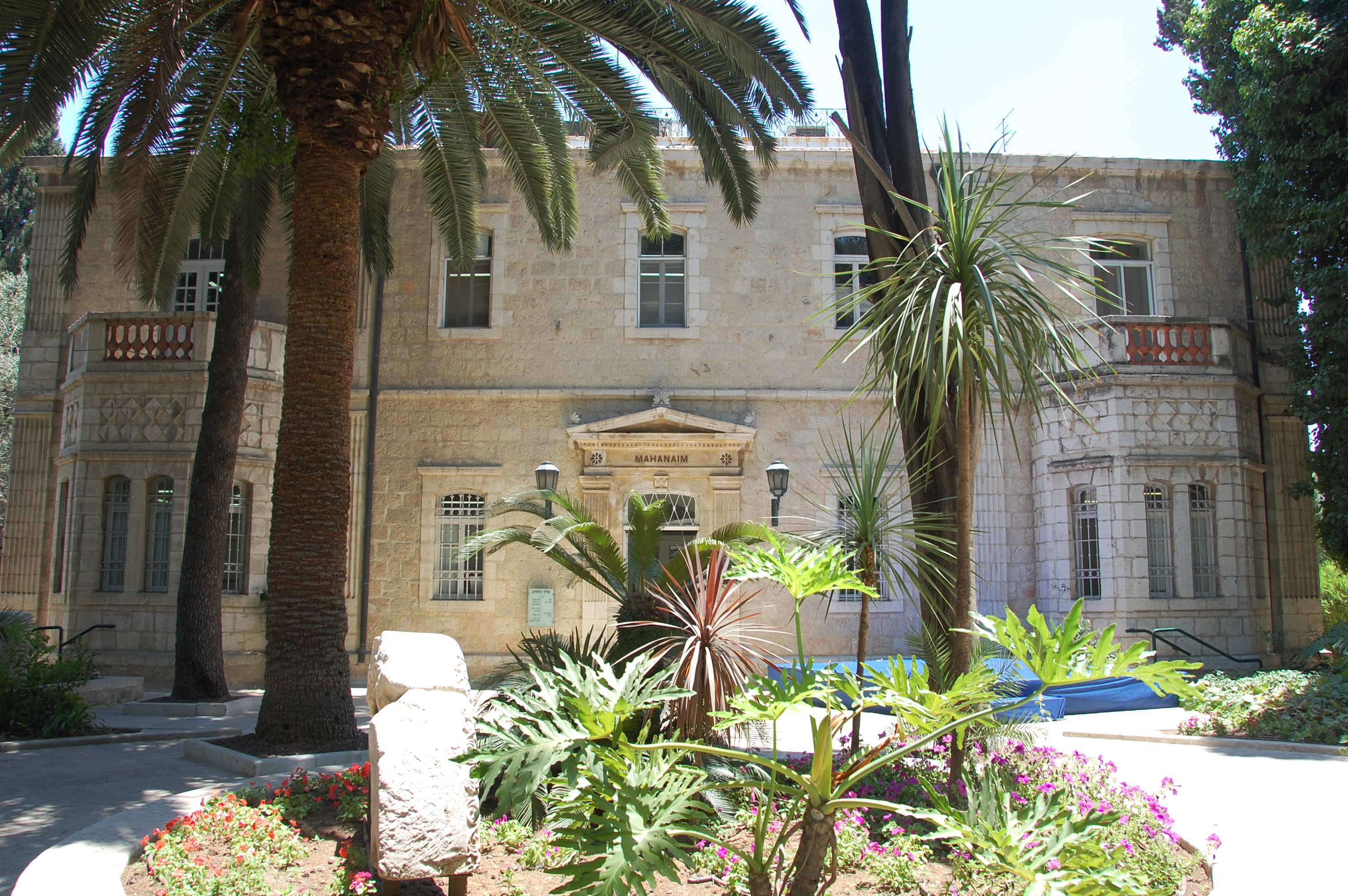 Mahanaim house, jerusalem 2007